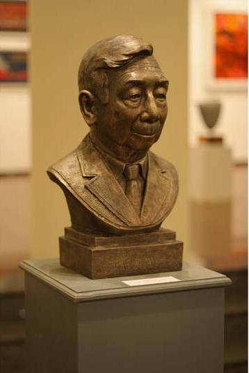 Tượng Trần Lâm Biền đặt trong phòng trưng bày của trường Đại học Mỹ thuật Việt Nam. Tác giả: Trần Đình Bảo, chất liệu composite, cao 45cm